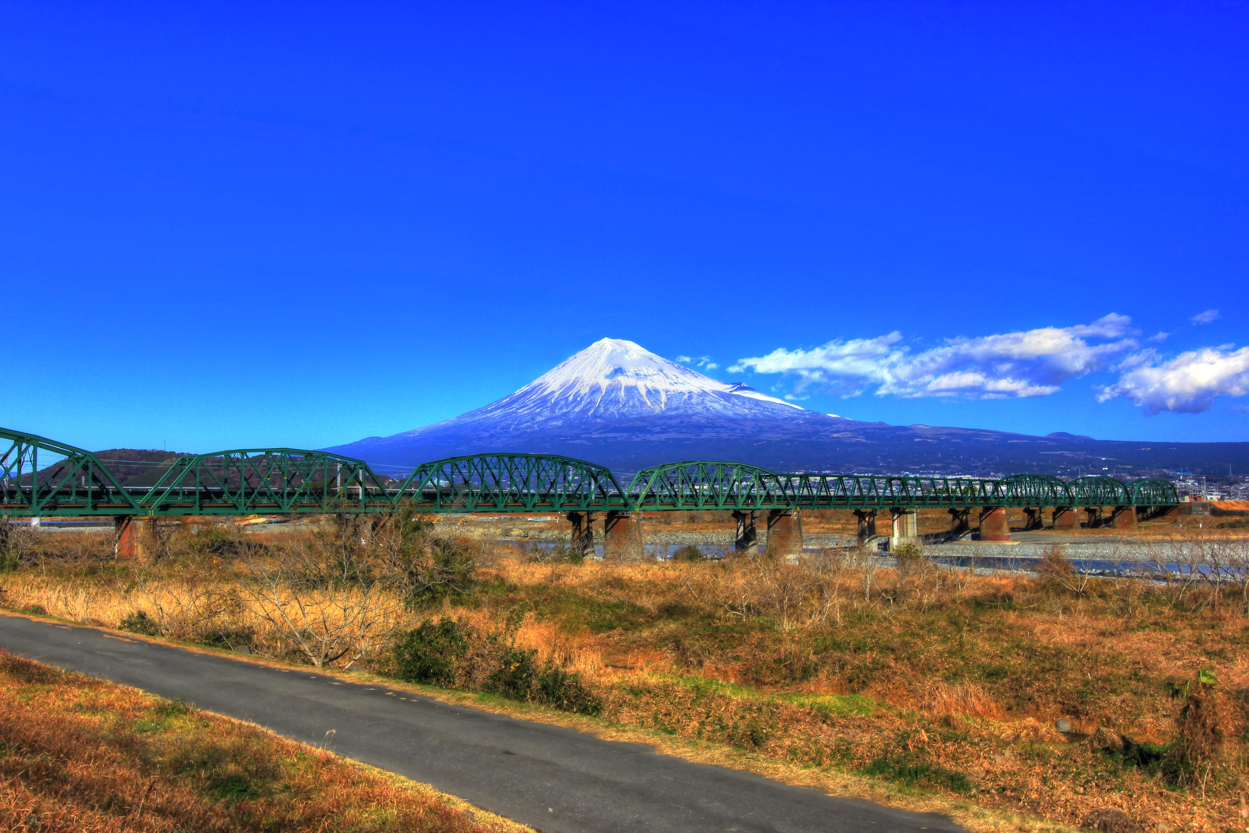 富士川